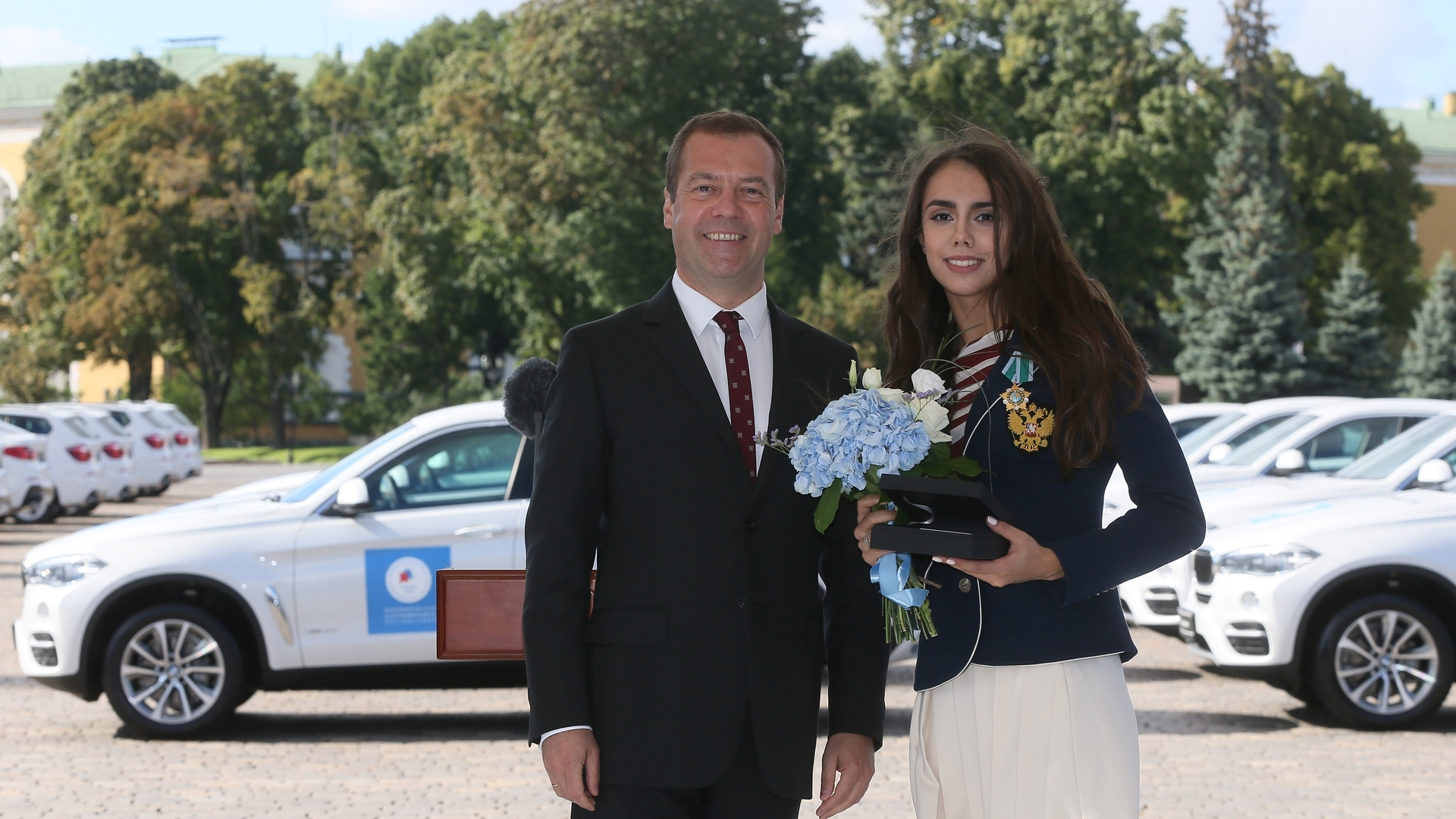 Дмитрий Медведев и чемпионка Игр XXXI Олимпиады в Рио-де-Жанейро по художественной гимнастике Маргарита Мамун